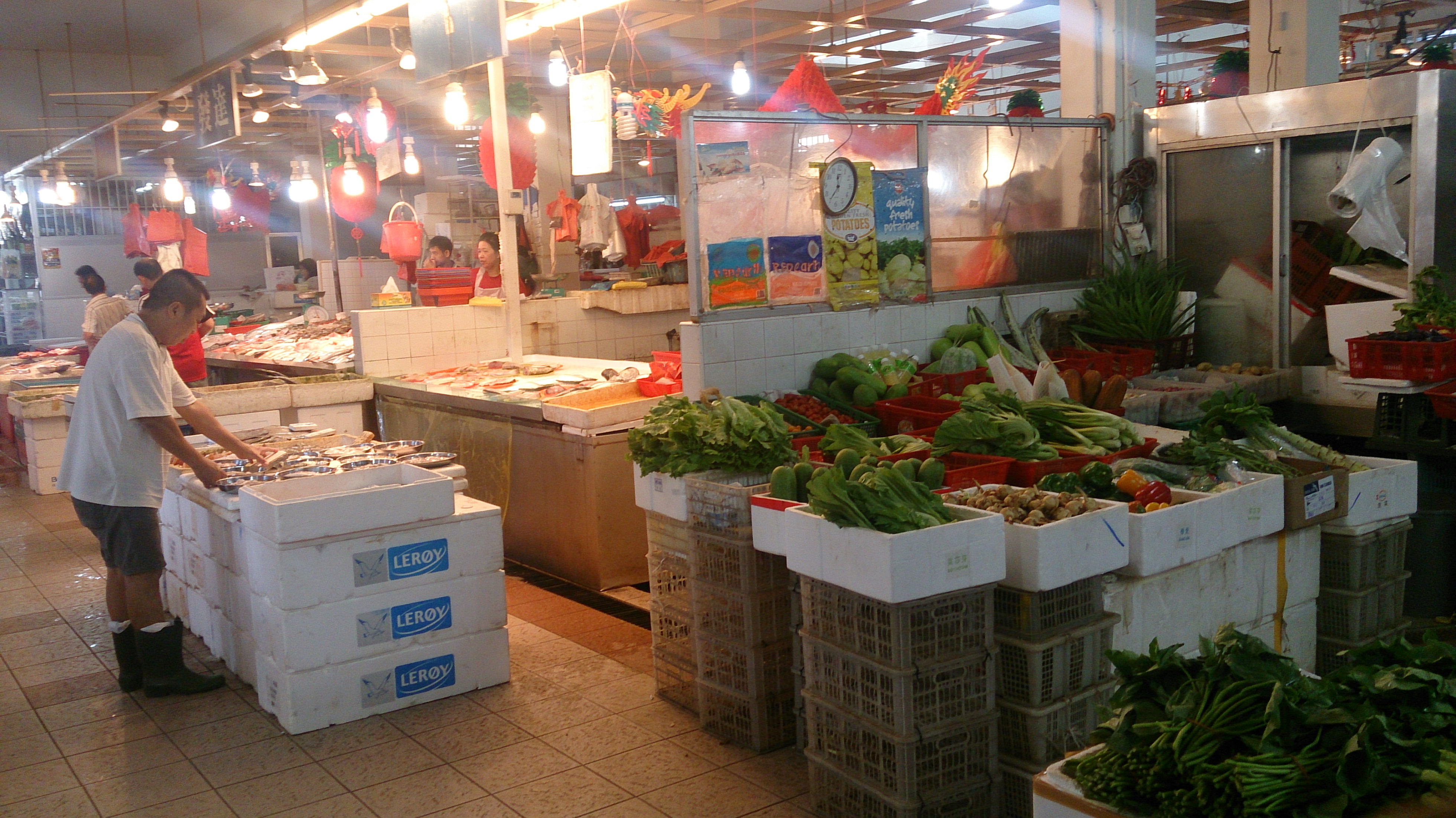 fish and vegetable stalls